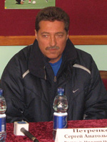 Петренко Сергей Анатольевич, тренер по футболу.